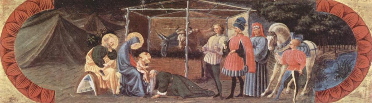 Die Szene ist als Gemälde unterhalb des Altares in der Chiesa San Bartolomae a Quarante, Firenze konzipiert worden